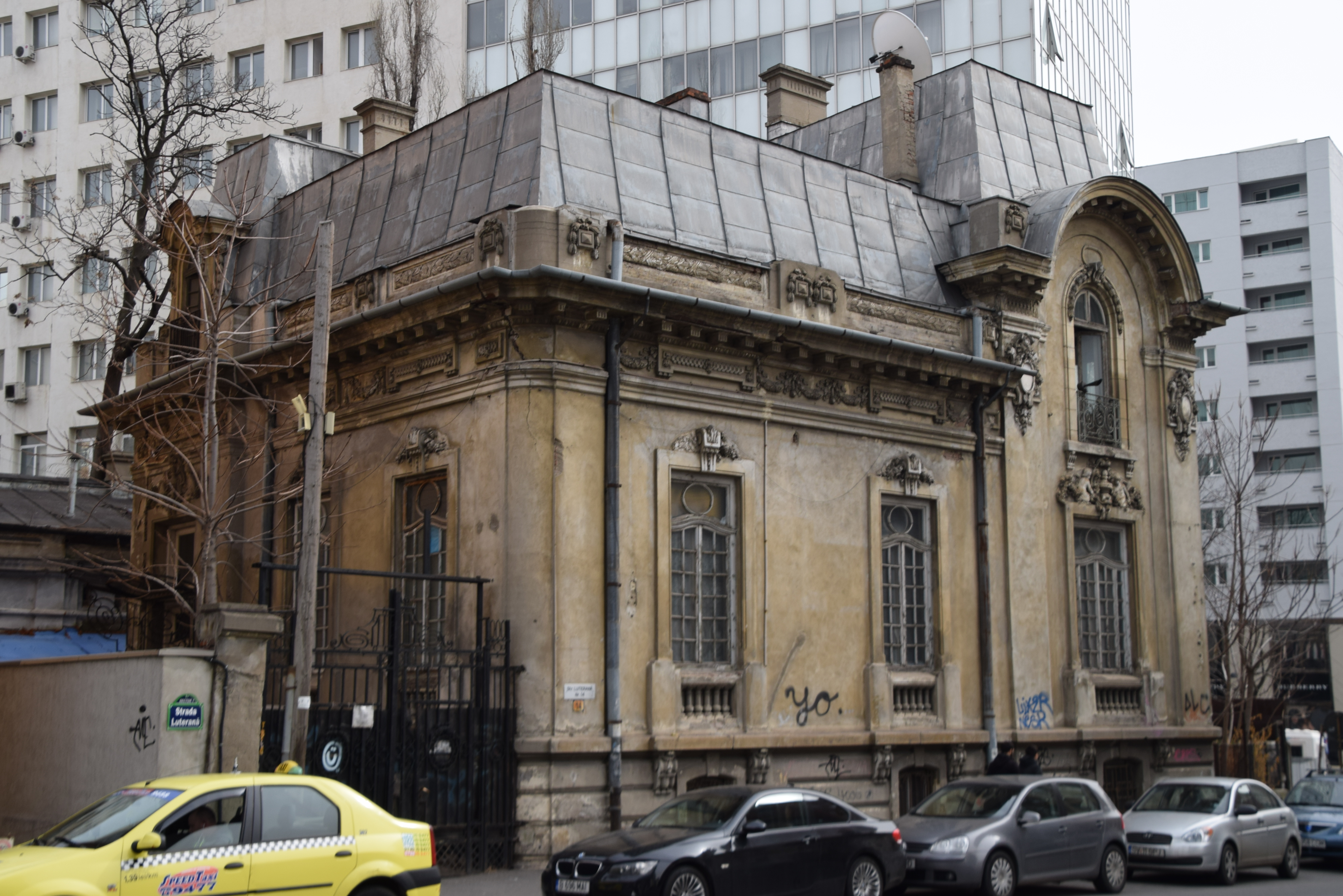 Casă pe strada Luterană nr. 14